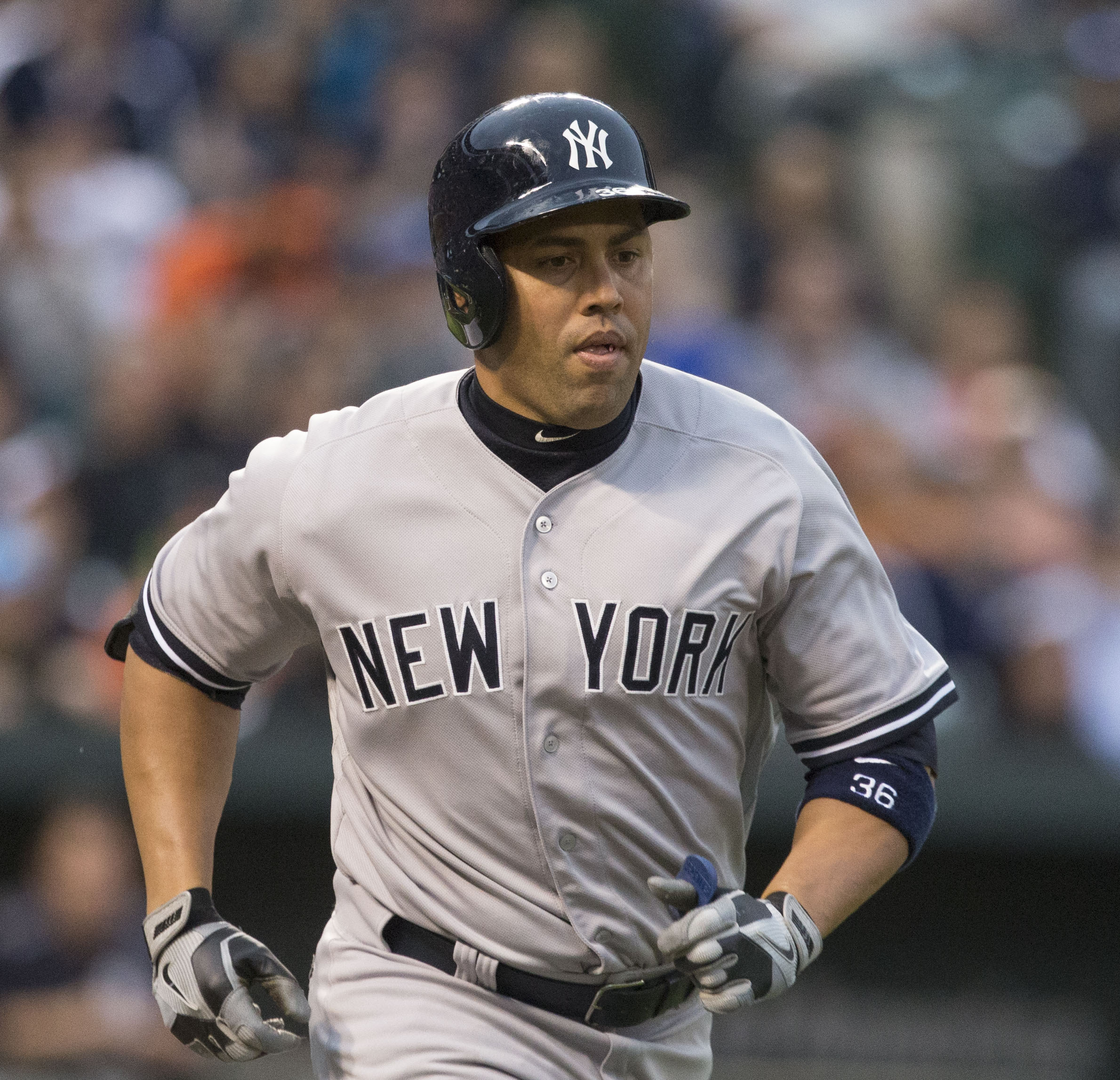 Yankees at Orioles 04/15/15